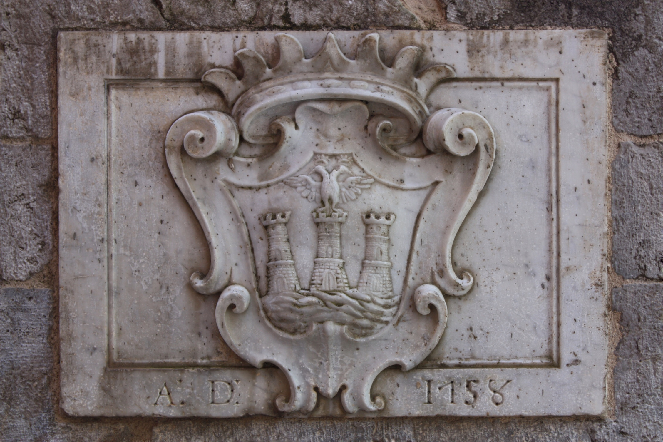 Stemma di Maratea posto sulla colonna di S. Biagio (1758)